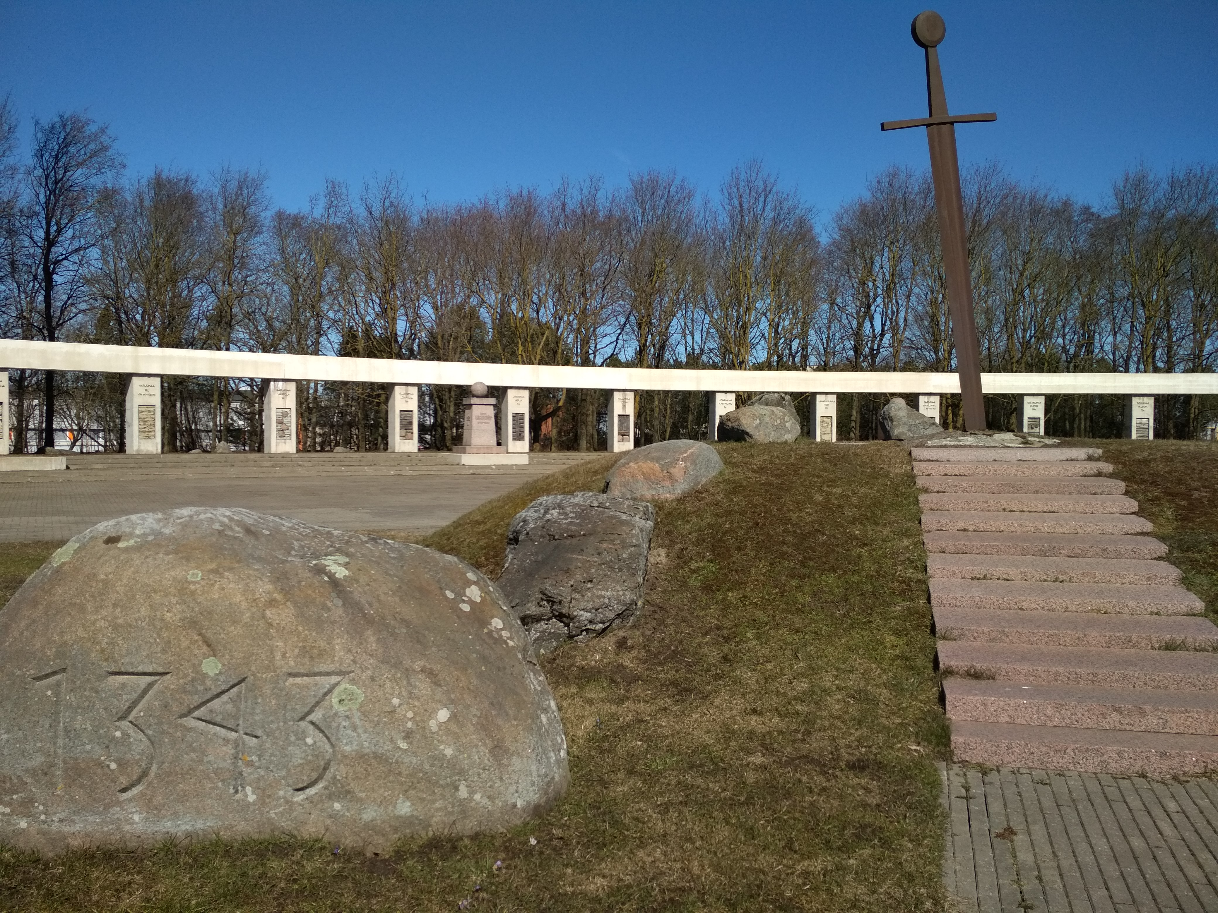 Jüriöö ülestõusu mälestusmärk (kivi ja mõõk) Jüriöö pargis Tallinnas